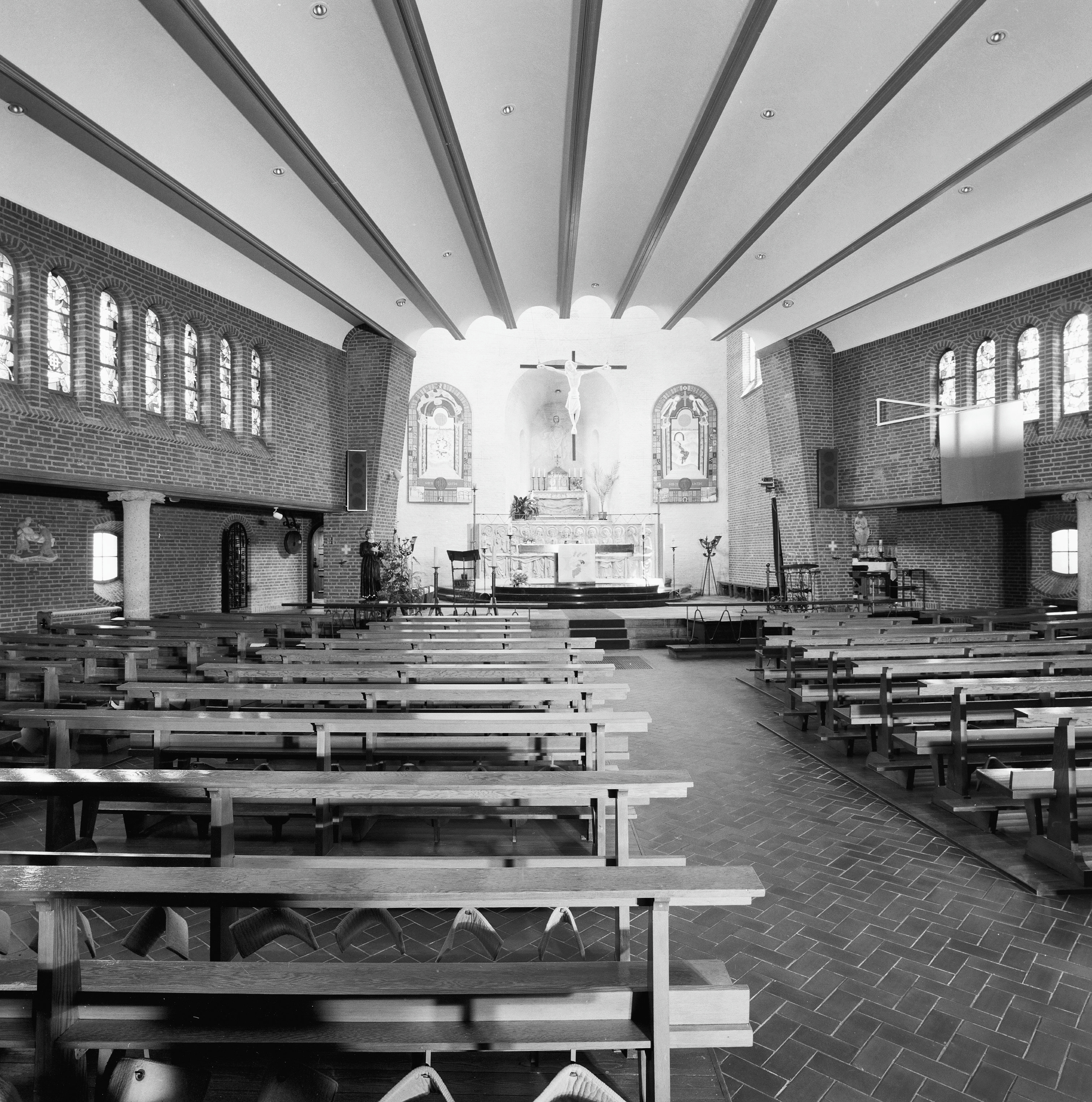 Sint Gerardus Majellakerk: Interieur, overzicht naar het altaar (opmerking: Gefotografeerd voor Monumenten In Nederland Limburg)